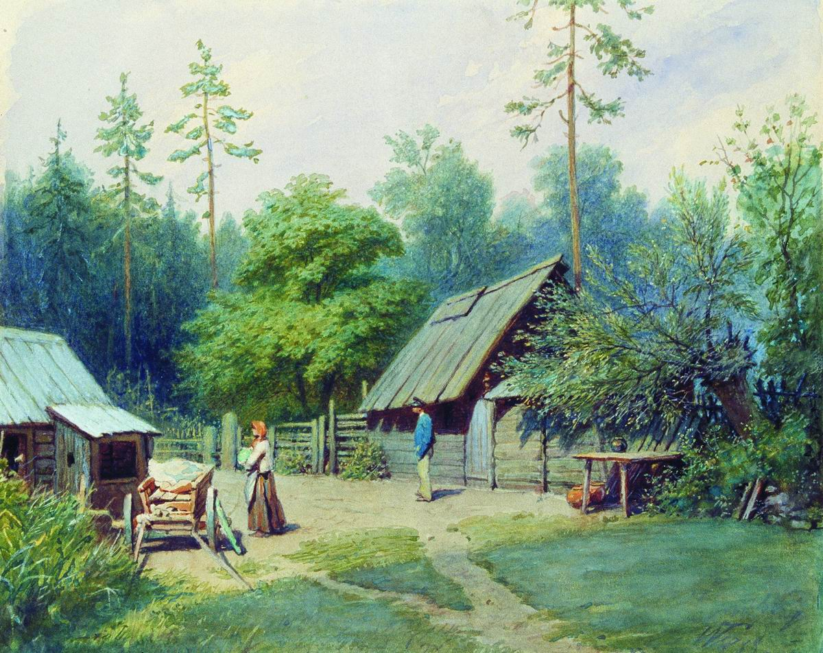 В. Ф. Тимм. Крестьянский двор.